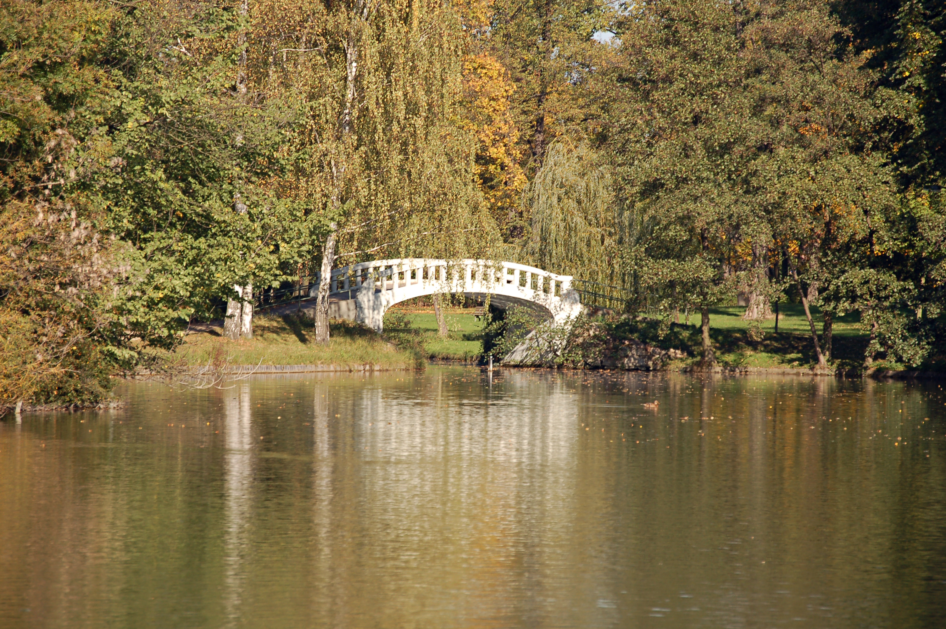 Ansichten aus dem Höchster Stadtpark